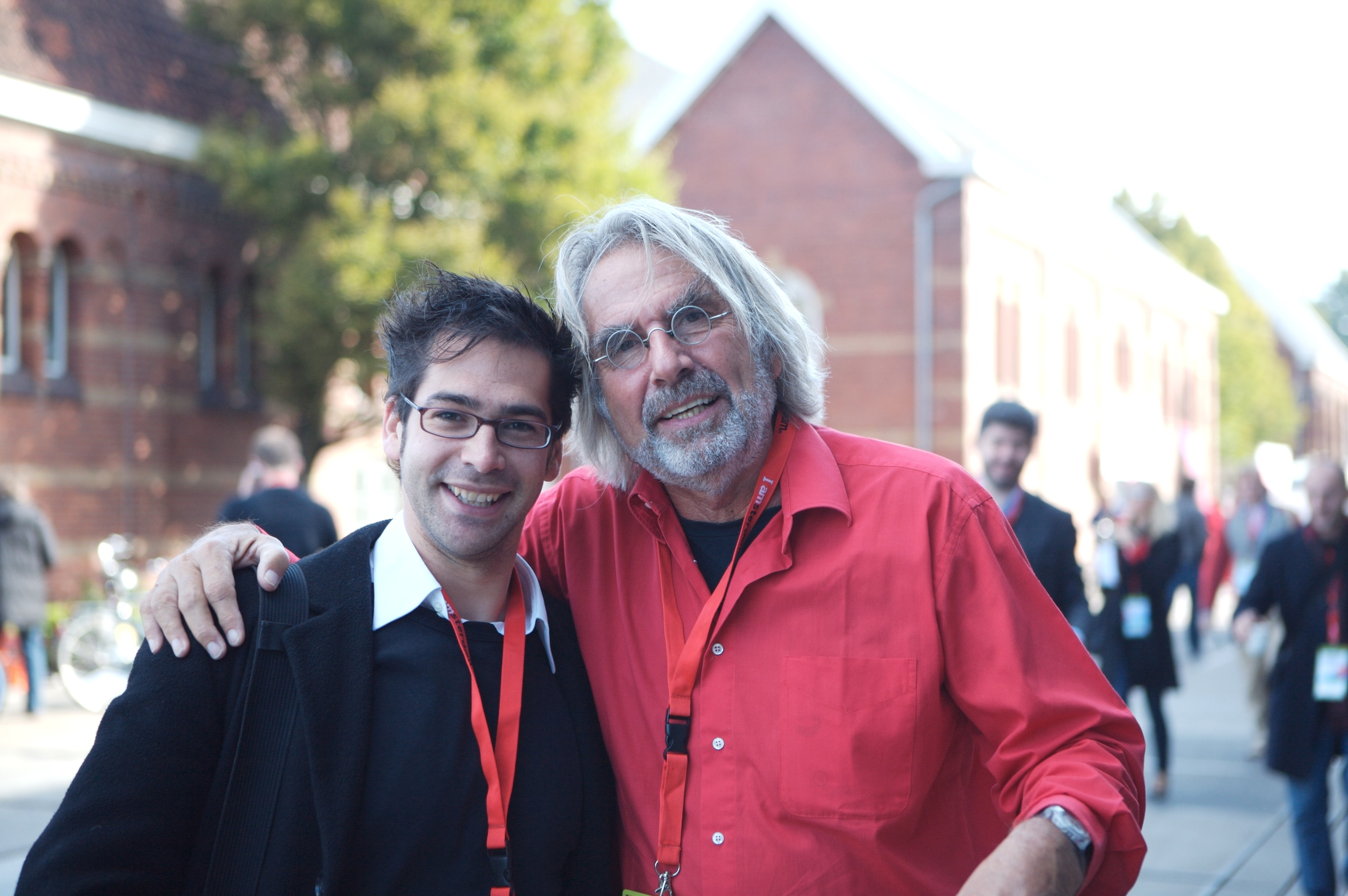 Sebastiaan ter Burg & Eckart Wintzen @ Picnic 2007